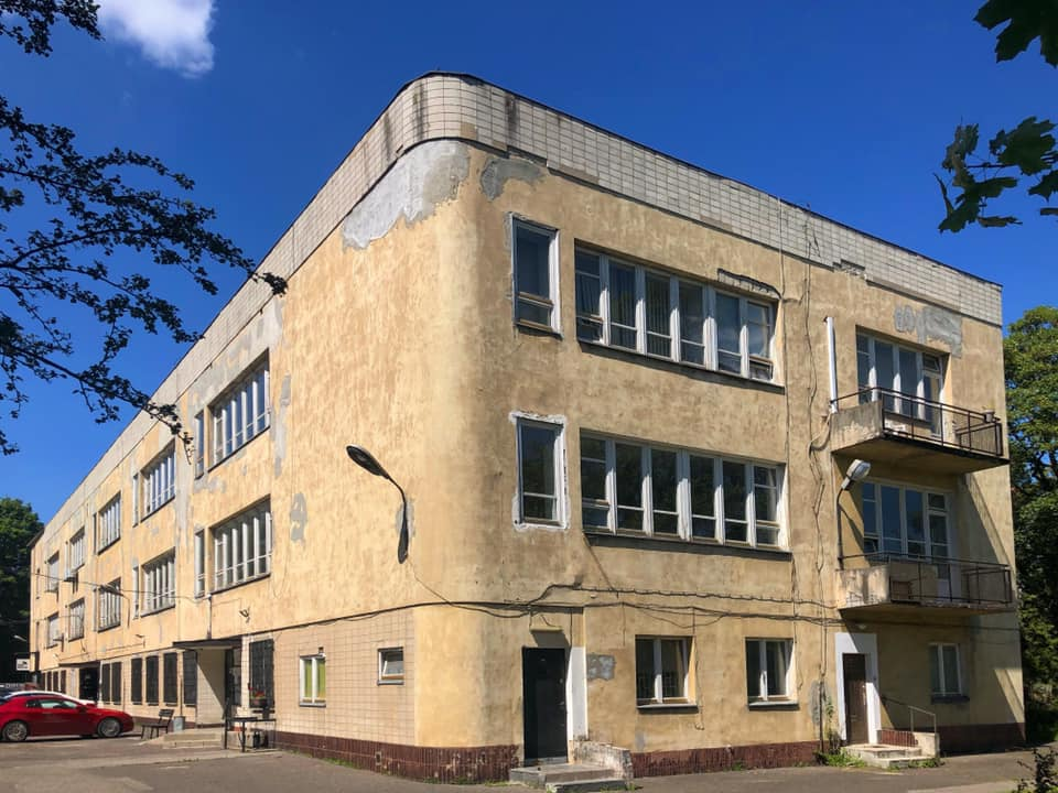 Dawny budynek szkolny z 1936